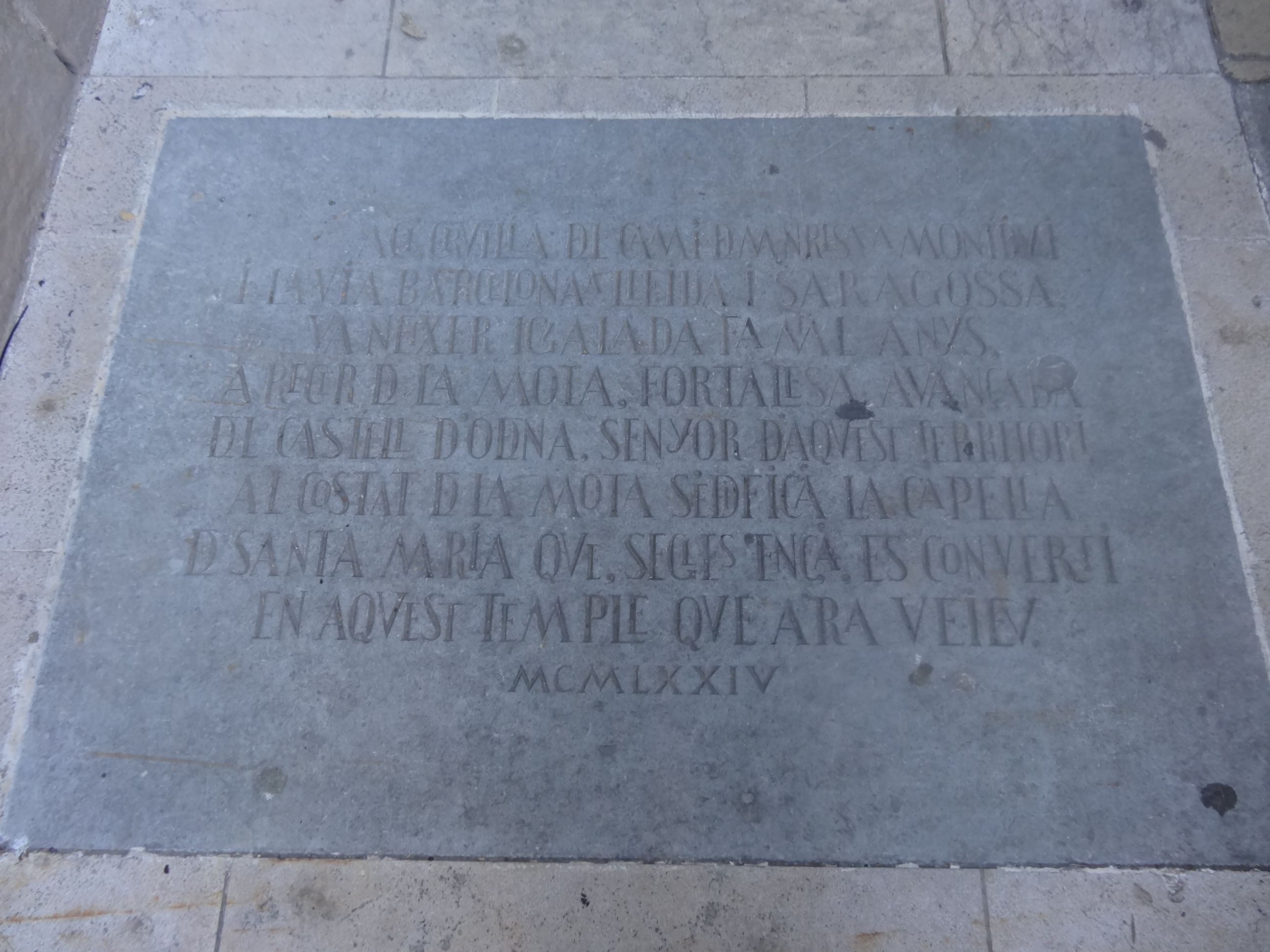 Placa commemorativa al paviment de la plaça Pius XII d'Igualada, darrera l'església de Santa Maria. Inicialment estava col·locada dreta damunt d’un escambell de pedra fins que l'arquitecta que va redissenyar la plaça la va col·locar plana a terra. Amb l' inscripció: ACÍ, CRUÏLLA DEL CAMÍ DE MANRESA A MONTBUI I LA VIA BARCELONA A LLEIDA I SARAGOSSA VA NÉIXER IGUALADA FA MIL ANYS A RECER DE LA MOTA, FORTALESA AVANÇADA DEL CASTELL D’ÒDENA, SENYOR D’AQUEST TERRITORI. AL COSTAT DE LA MOTA S’EDIFICÀ LA CAPELLA DE SANTA MARIA QUE, SEGLES ENÇÀ, ES CONVERTÍ EN AQUEST TEMPLE QUE ARA VEIEU. MCMLXXIV